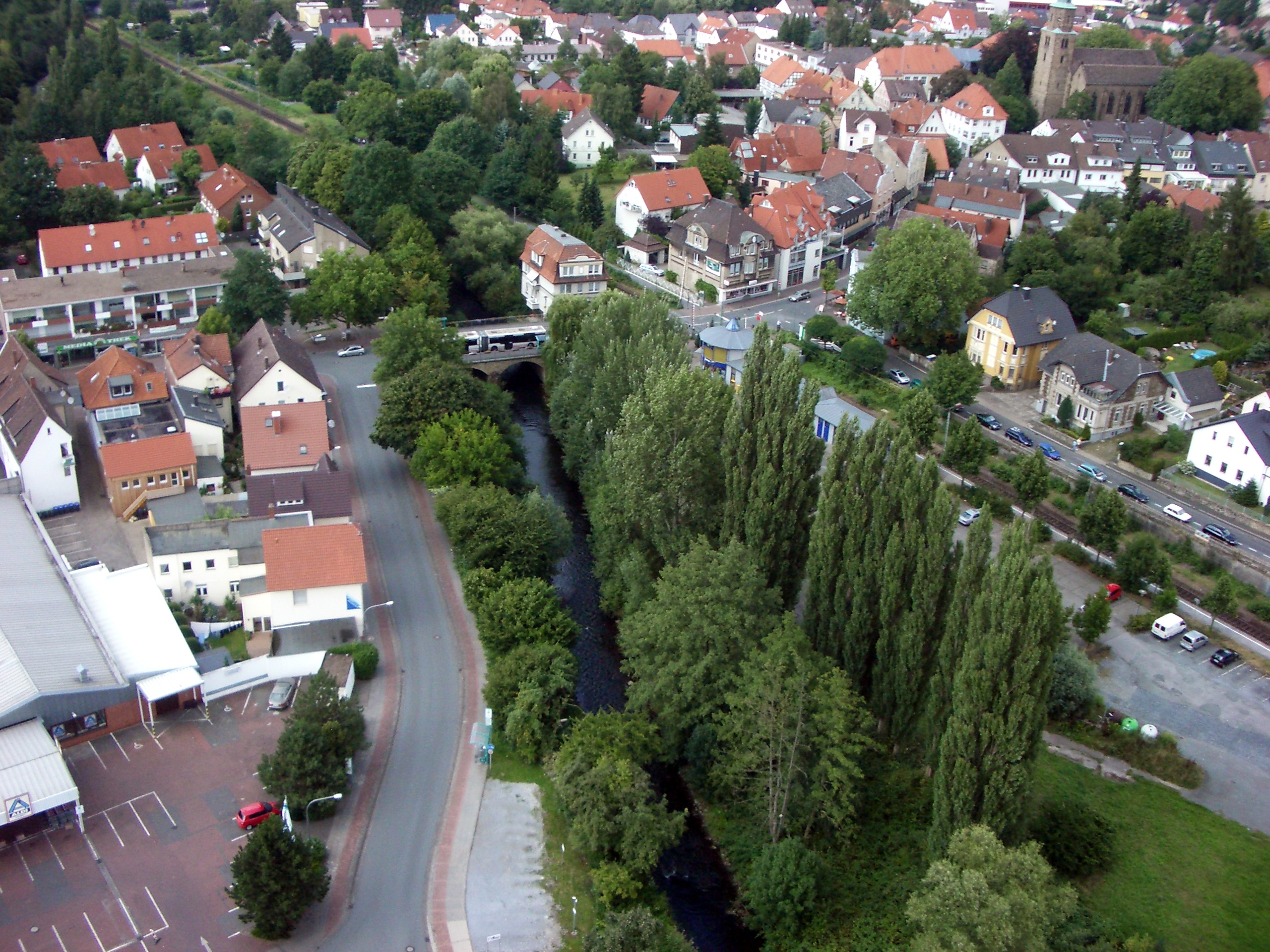 Brücke über die Bega am Bahnhof von Schötmar. Unten die Uferstraße. Quer verlaufend Begastraße und Krumme Weide. Rechts oben die Kilianskirche. Dies Luftbild wurde mit Hilfe eines Drachens aufgenommen, der die Kamera in eine Höhe von ca. 80 Meter gezogen hat.